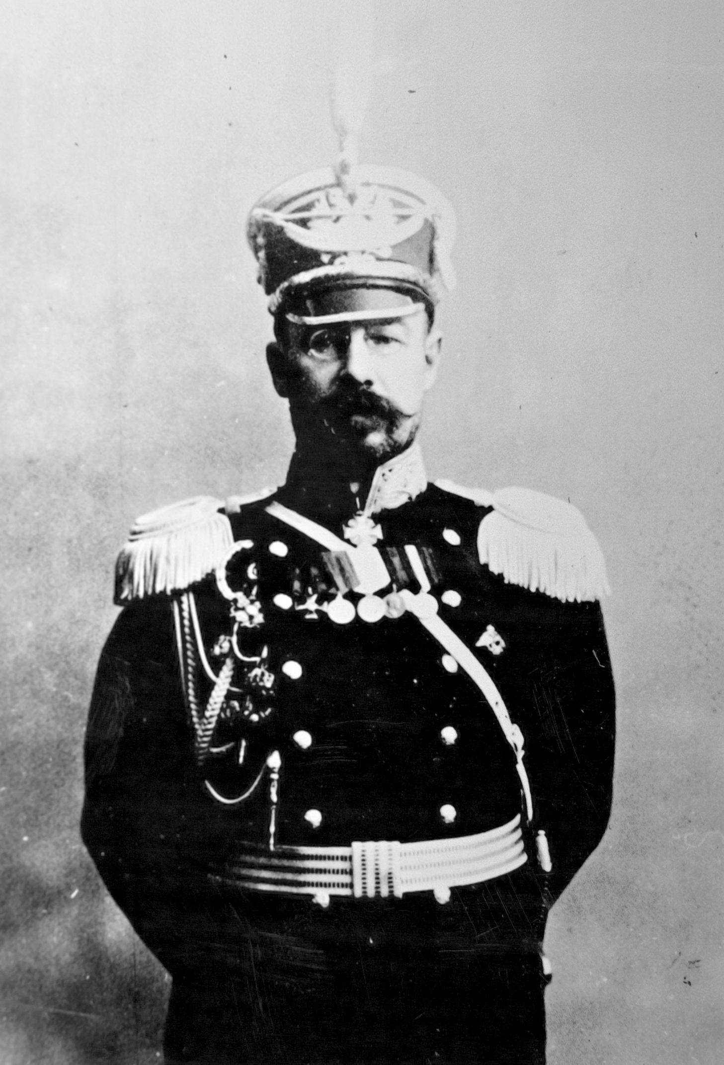 Михаил Дмитриевич Бонч-Бруевич, генерал